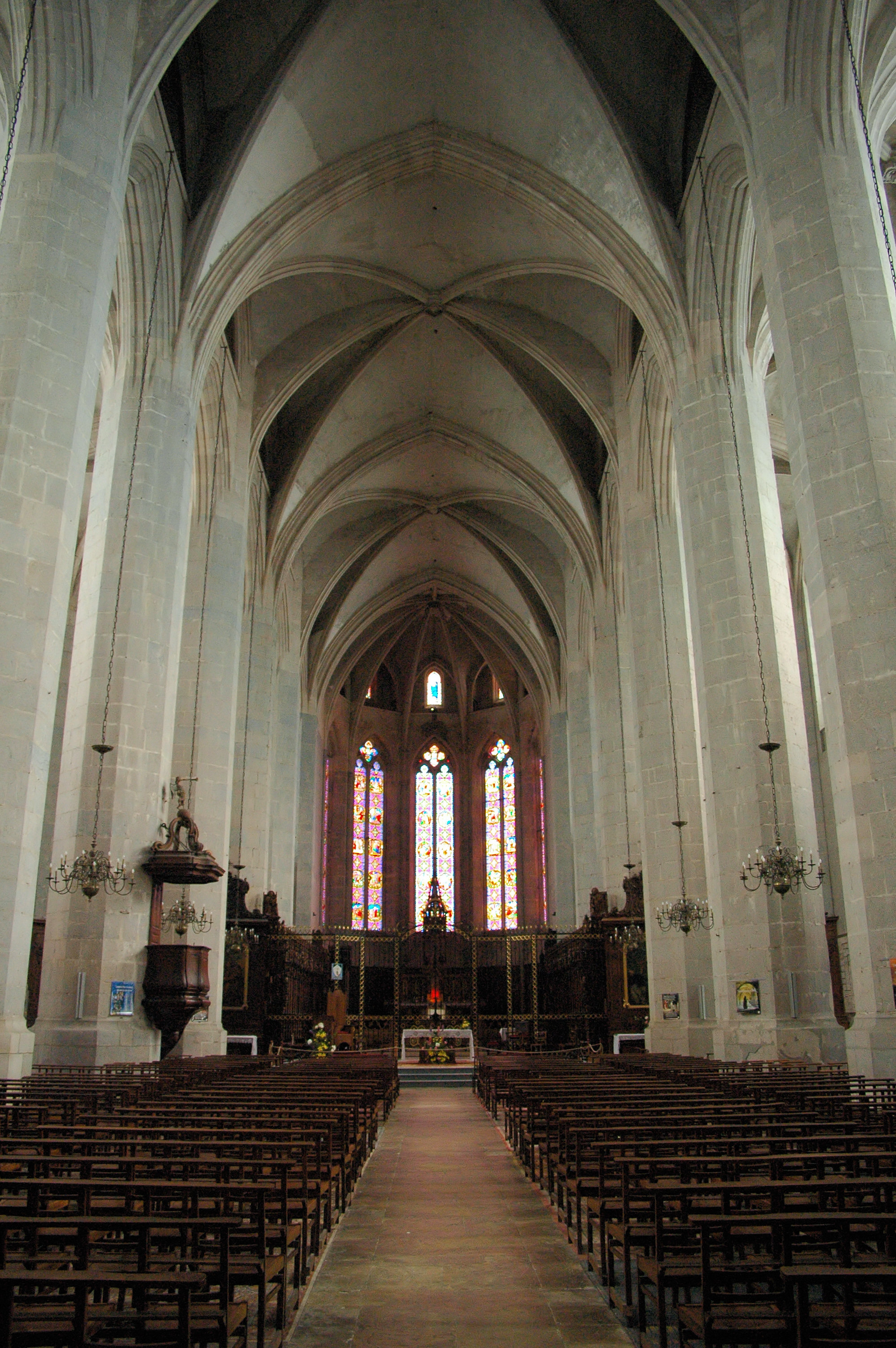 Intérieur de la cathédrale de Saint-Claude